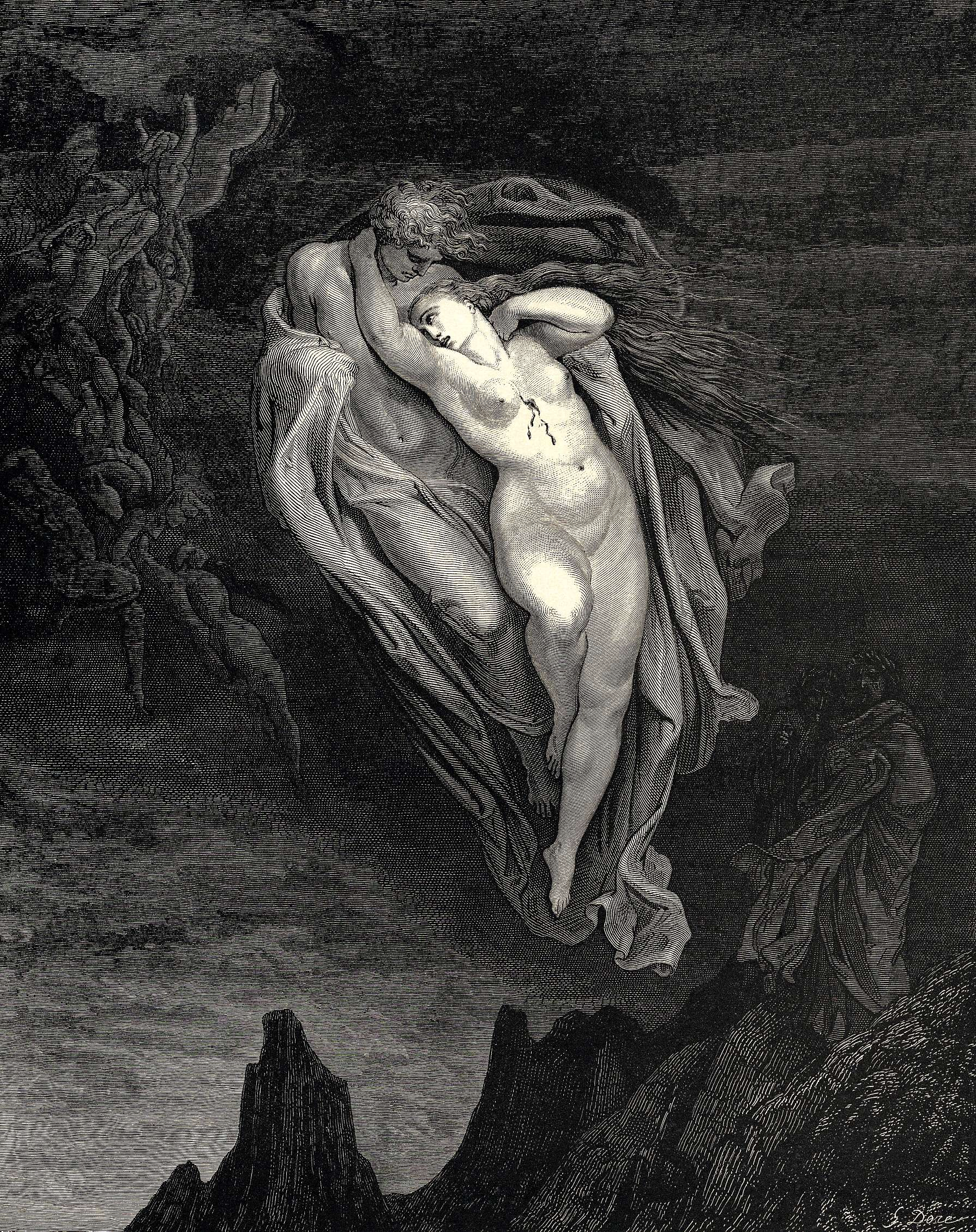 Gustave Doré Illustration zu Canto V von Dantes Inferno